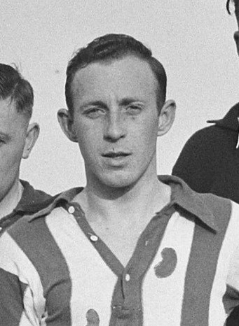 Germ Hofma in 1950.